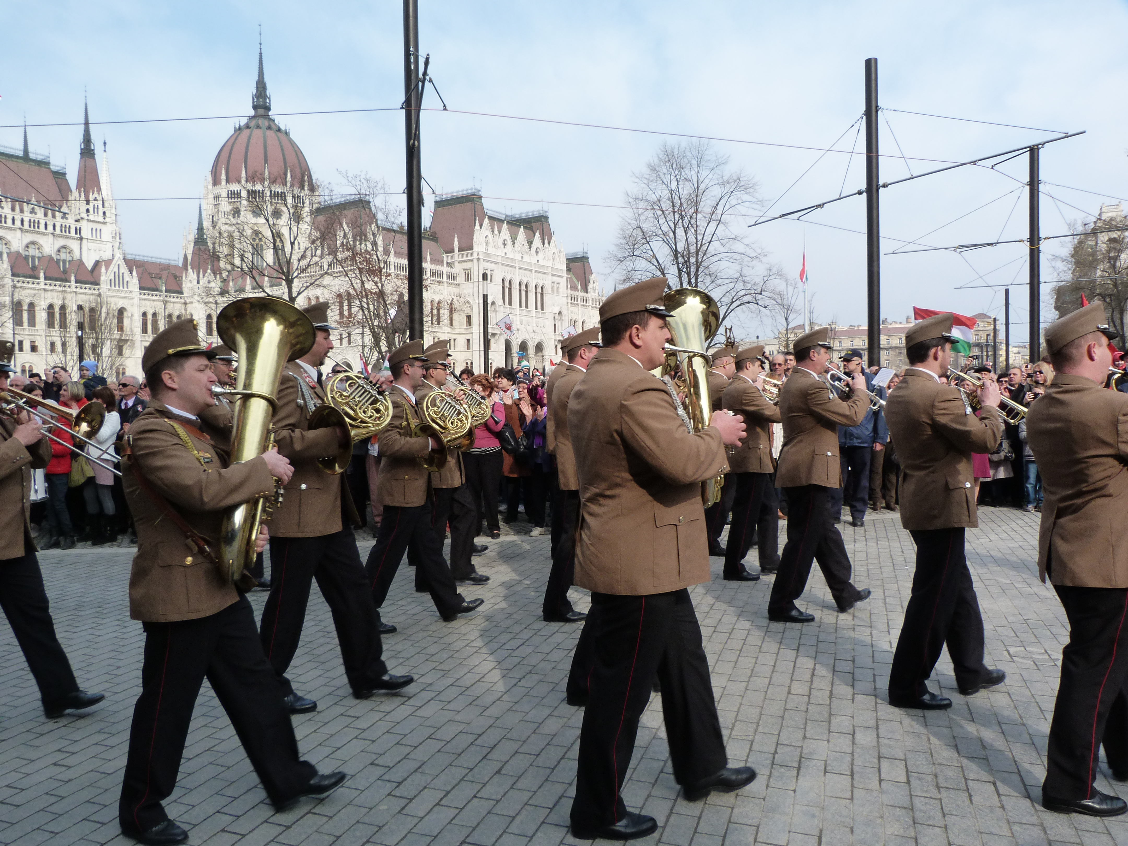 A felvétel 2014. március 15 -én készült Budapesten, a Kossuth téren. A katonazenekar felvonulása. ©© Derzsi Elekes Andor, Budapest, 2014, A kép és filmfelvételek egészben, vagy részletekben másolását, bármilyen úton történő sokszorosítását és felhasználását a szerző ellenérték nélkül, jogutódjaira is kihatóan megengedi. Az engedély kiterjed a kereskedelmi célú hasznosításra is. Kéri azonban nevének feltüntetését a felhasználás során. A Metapolisz sorozat valamennyi képe és filmje Creative Commons alatti valamint kereskedelmi - for profit - célra is felhasználható. Ajánlott hivatkozás: Derzsi Elekes Andor: Metapolisz DVD line